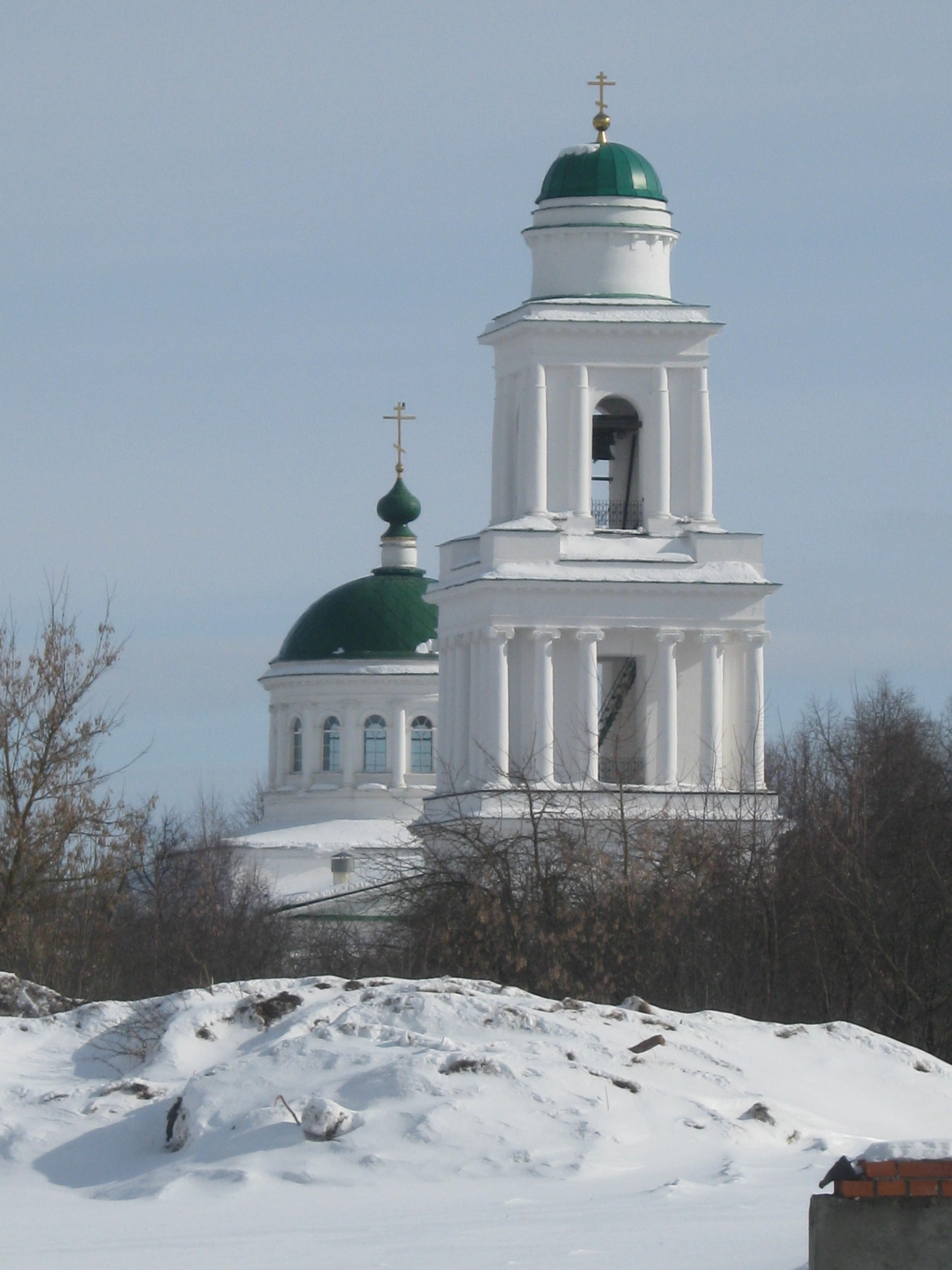 Вид на Оковецкую церковь во Ржеве